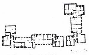 План дома па вуліцы Кірава, 19 (Мінск)